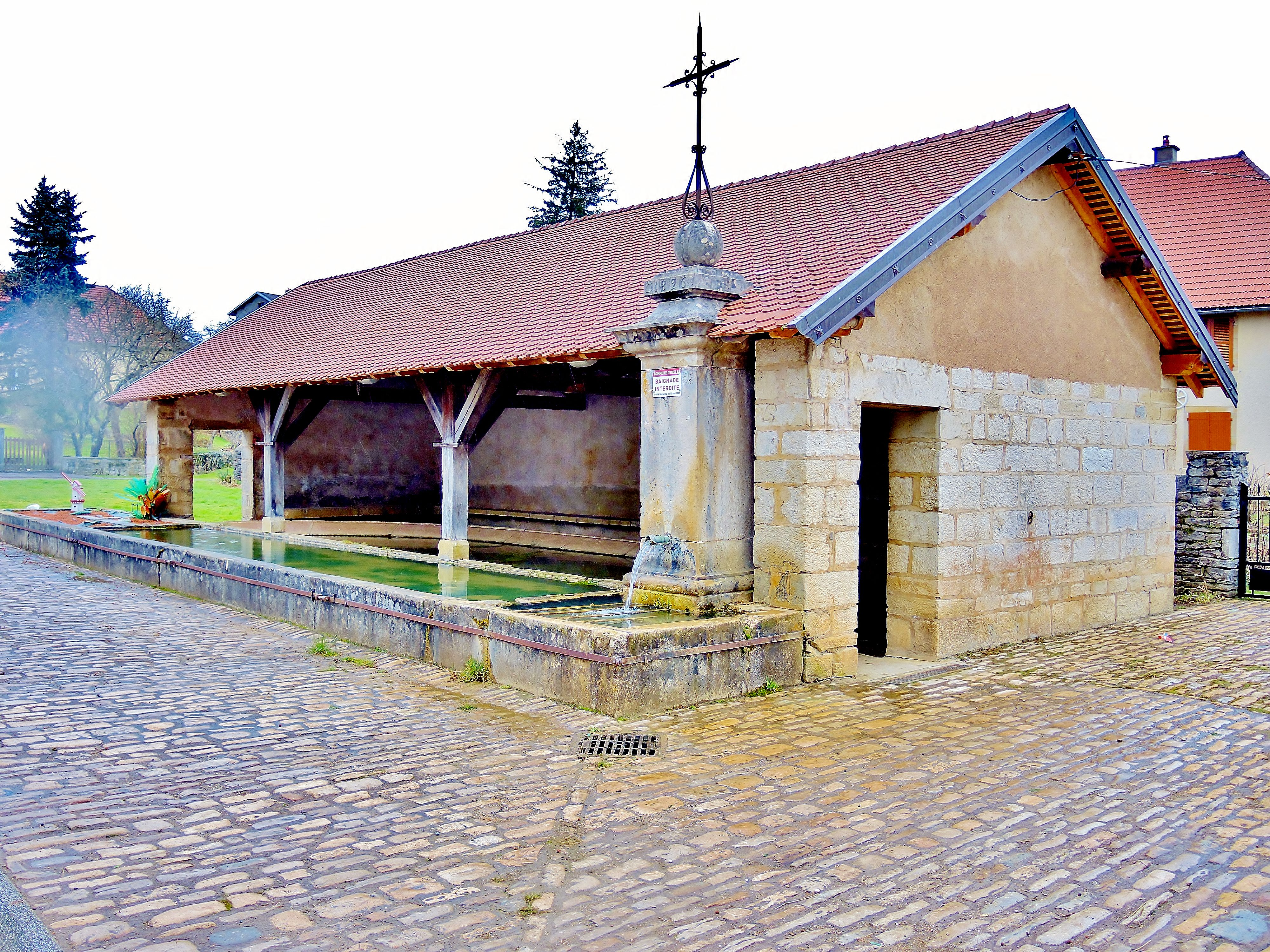 Fontaine-lavoir à l'entrée Nord du village d'Uzelle. Département du Doubs. France.